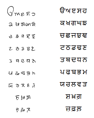 гурмукхи рукопись